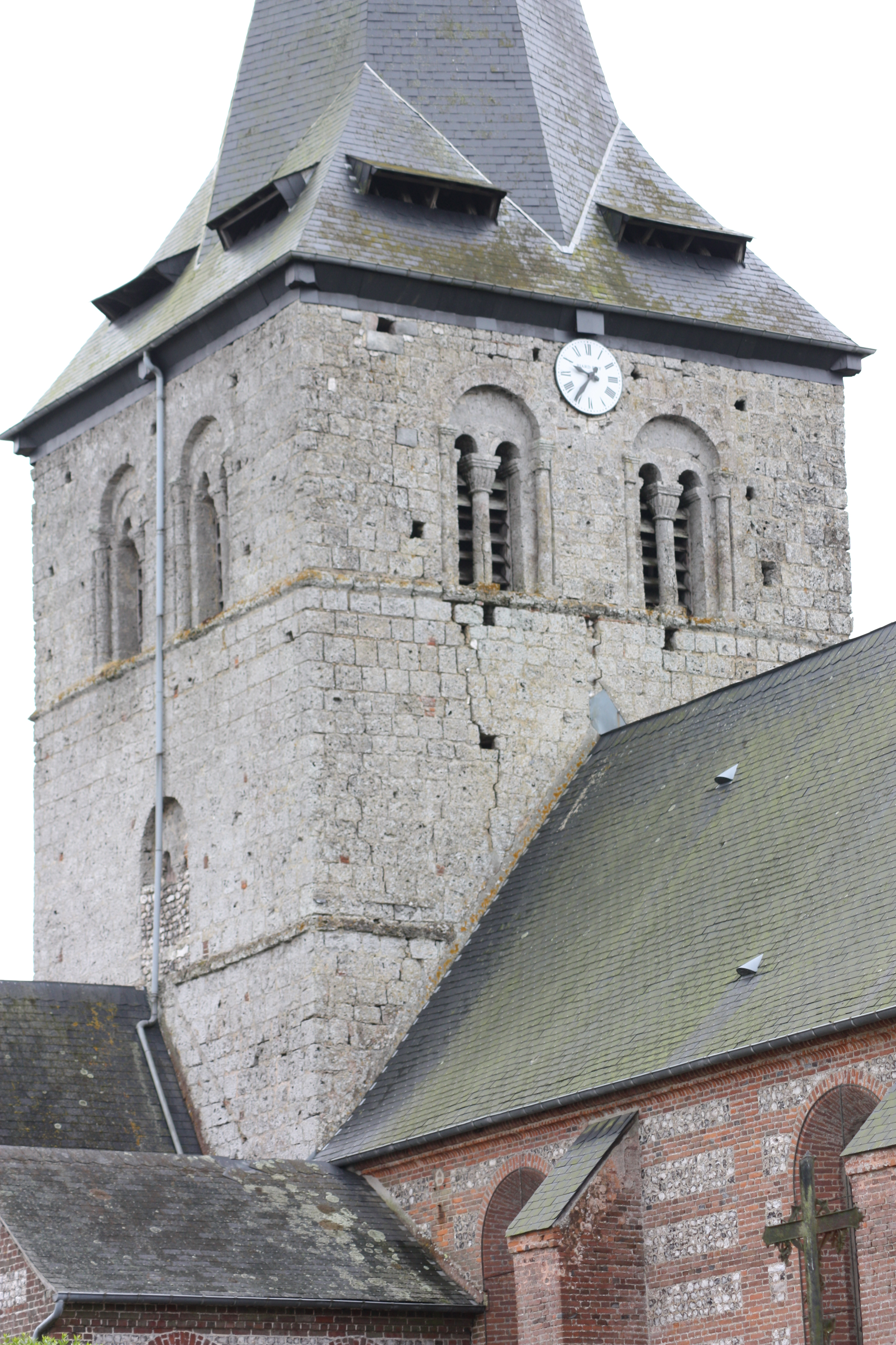 Sainte-Foy - Eglise Sainte-Foy Vue du clocher à l'angle Nord-Ouest